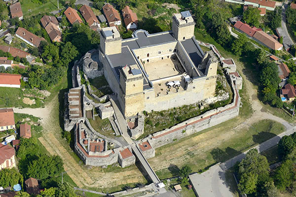 Diósgyőri vár 2016